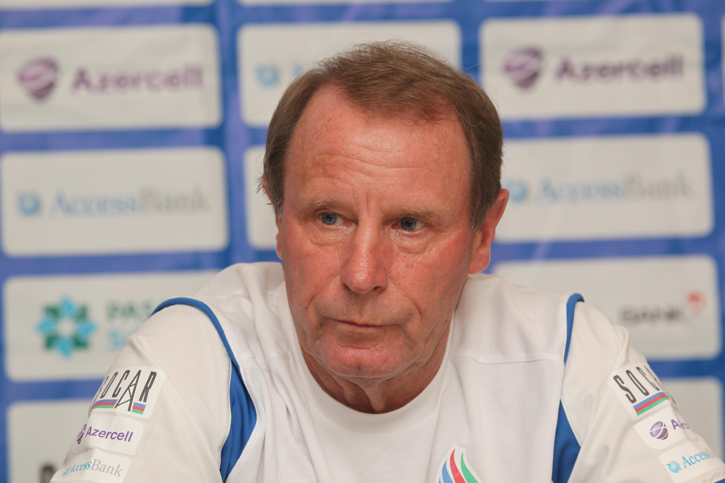 Berti Foqts